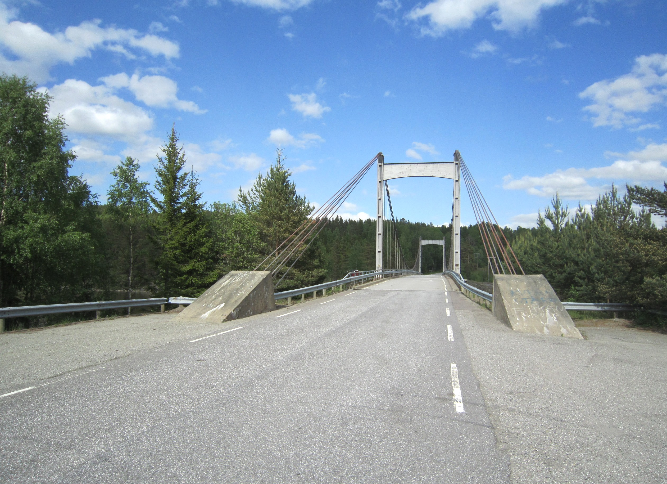 Bro med fylkesvei 123 ved Kroksund i Marker kommune